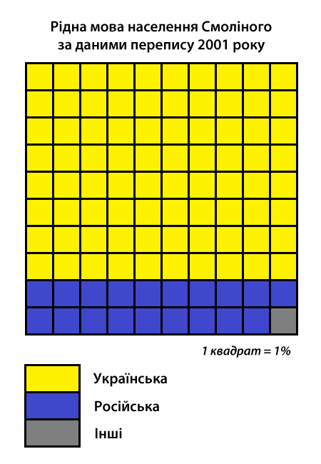 Інфографіка розподілу населення смт Смоліне Маловисківського району за рідною мовою згідно з даними перепису 2001 року. Джерело: Розподіл населення Кіровоградської області за рідною мовою (у % до загальної чисельності населення) за переписом 2001 року